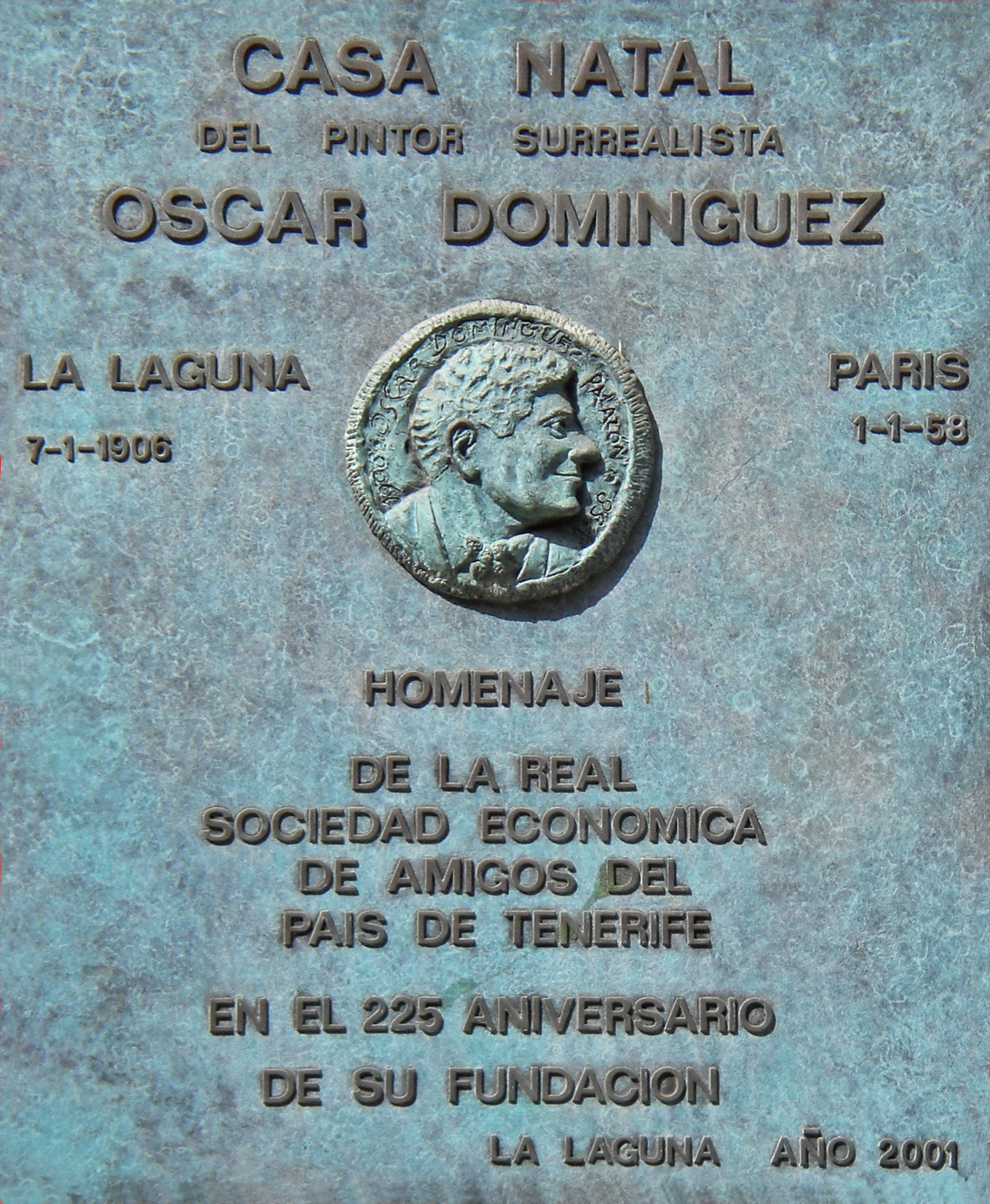 Gedenktafel am Geburtshaus von Oscar Dominguez in La Laguna